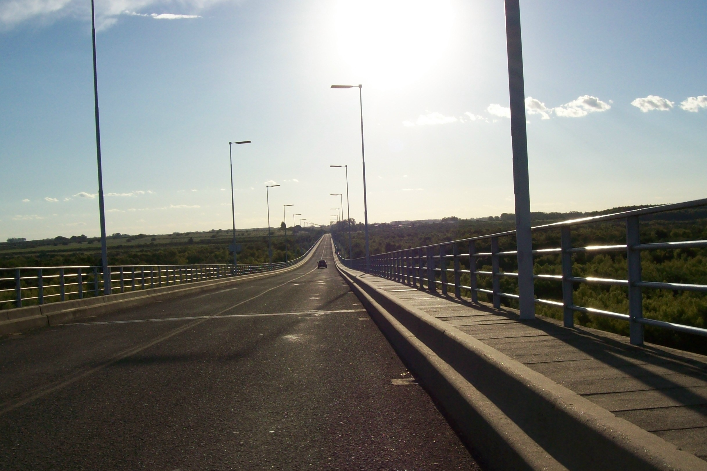 Atardecer en el Puente General Artigas sobre el Río Uruguay. Adelante, Ruta Nacional 135.